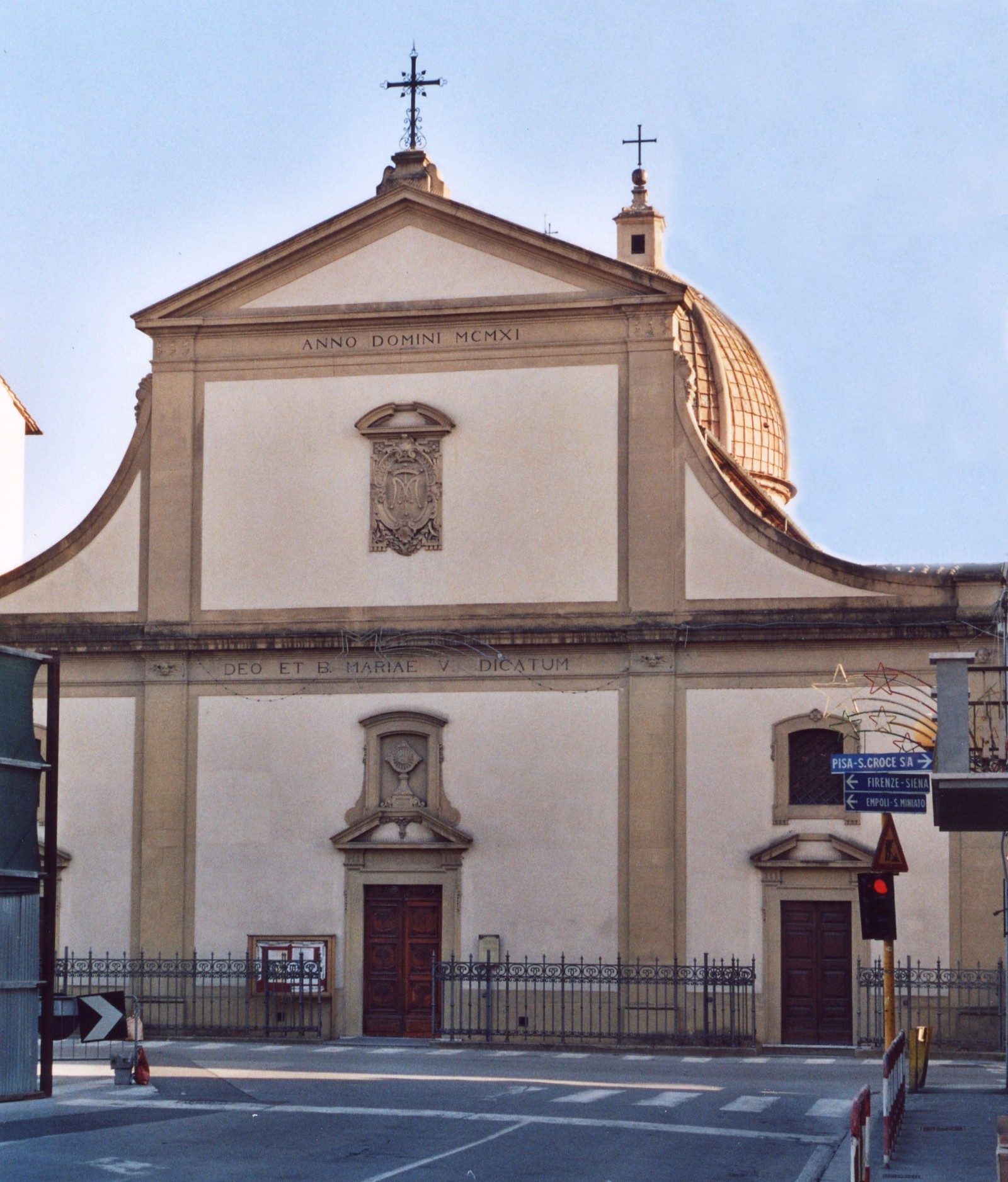 Fucecchio, Province of Florence, Italy. Chiesa di Santa Maria delle Vedute